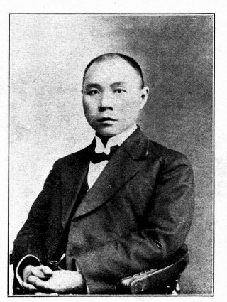 中文（台灣）: 王有蘭議員